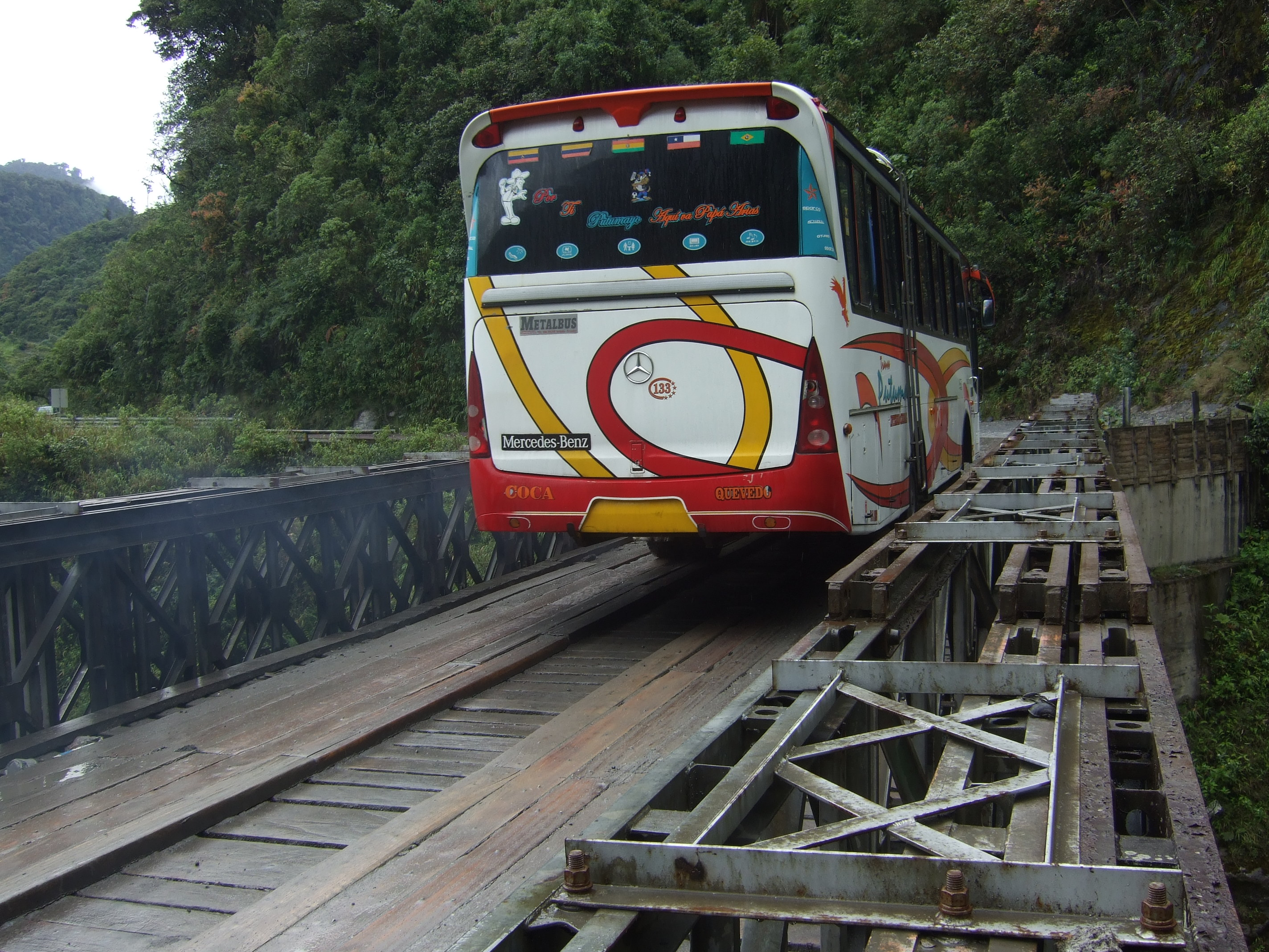 Bus near Paso Papallacta, Ecuador